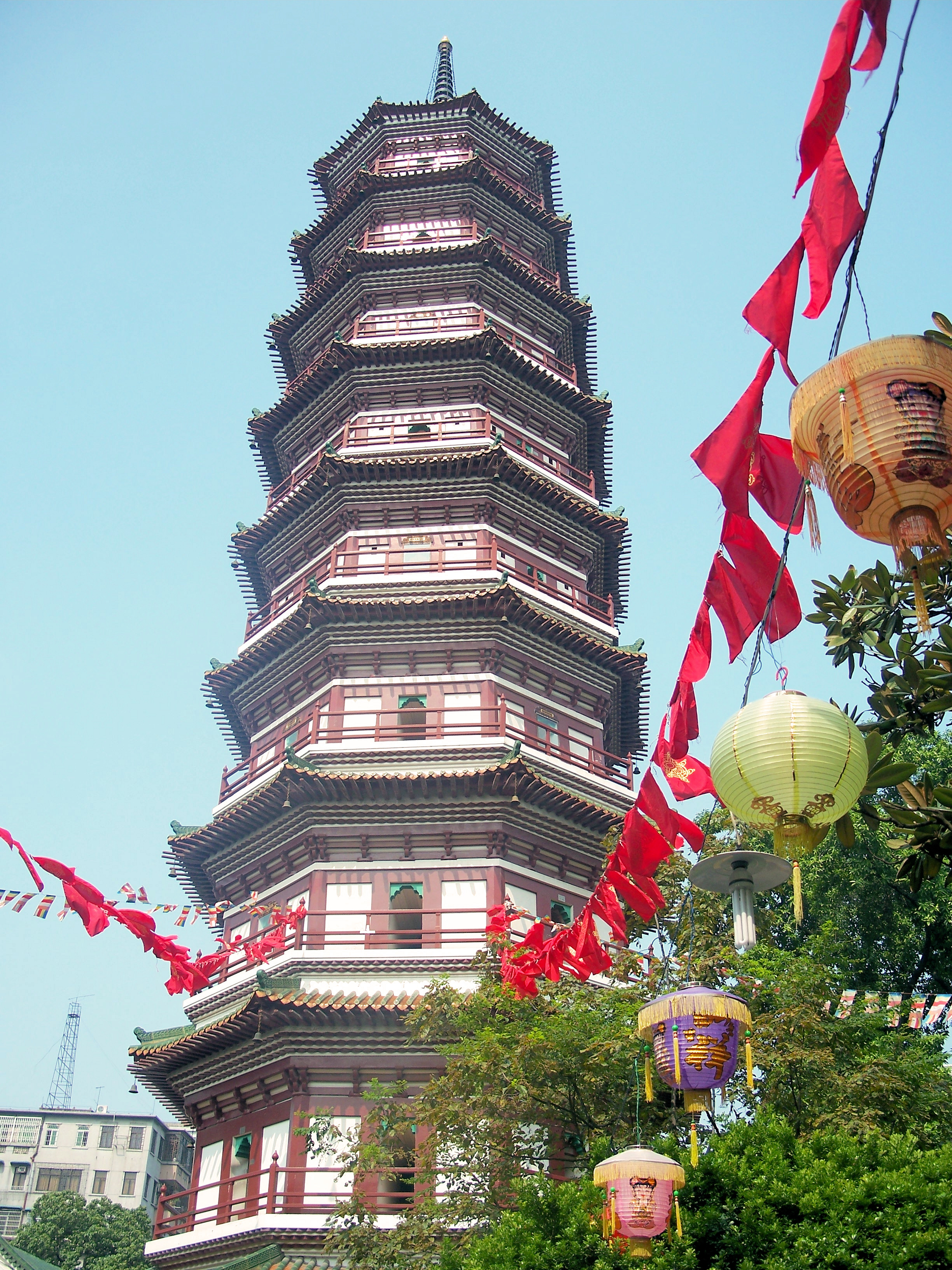 粵語: 六榕寺花塔